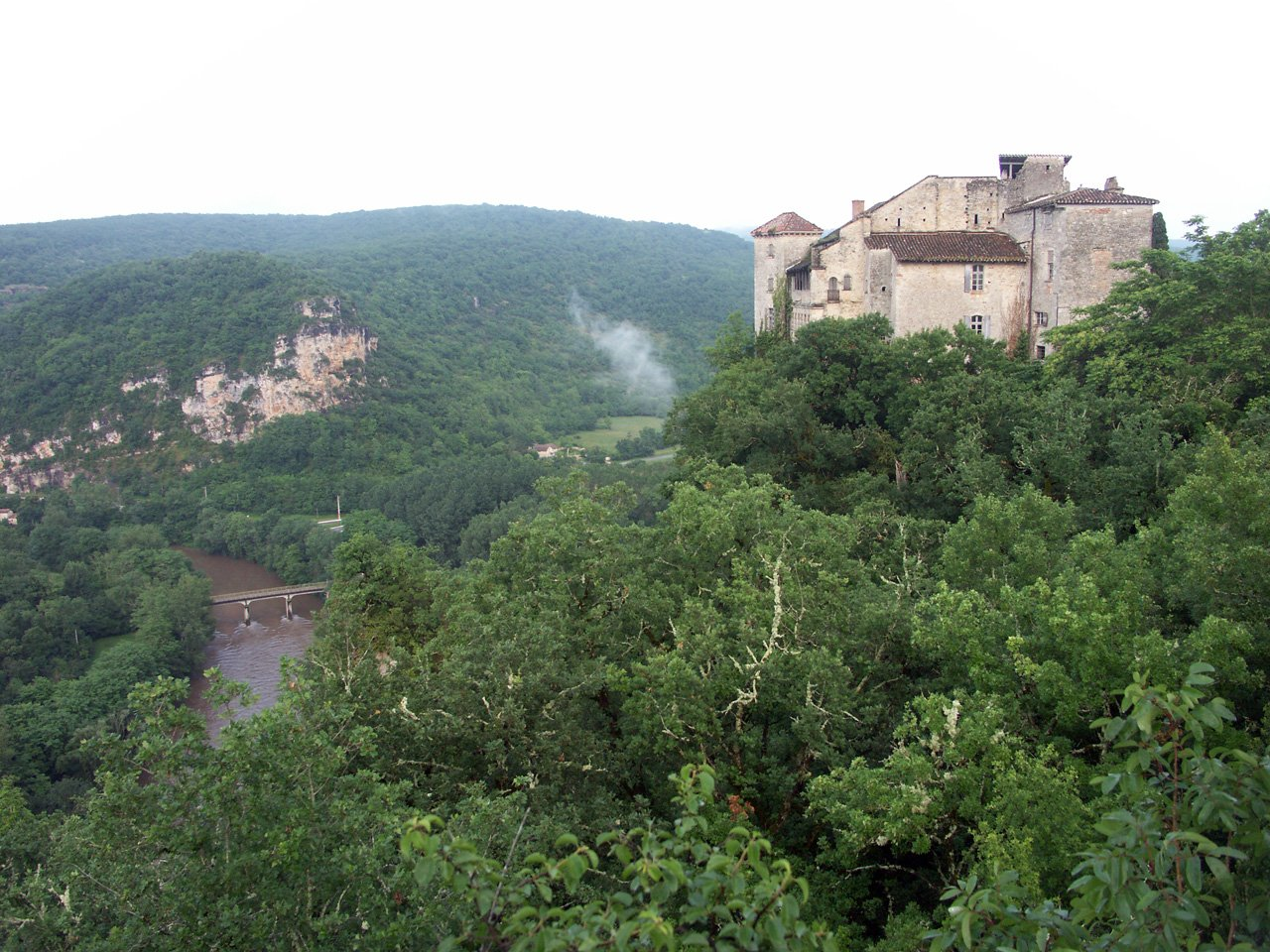 Châteaux de Bruniquel, vue nord